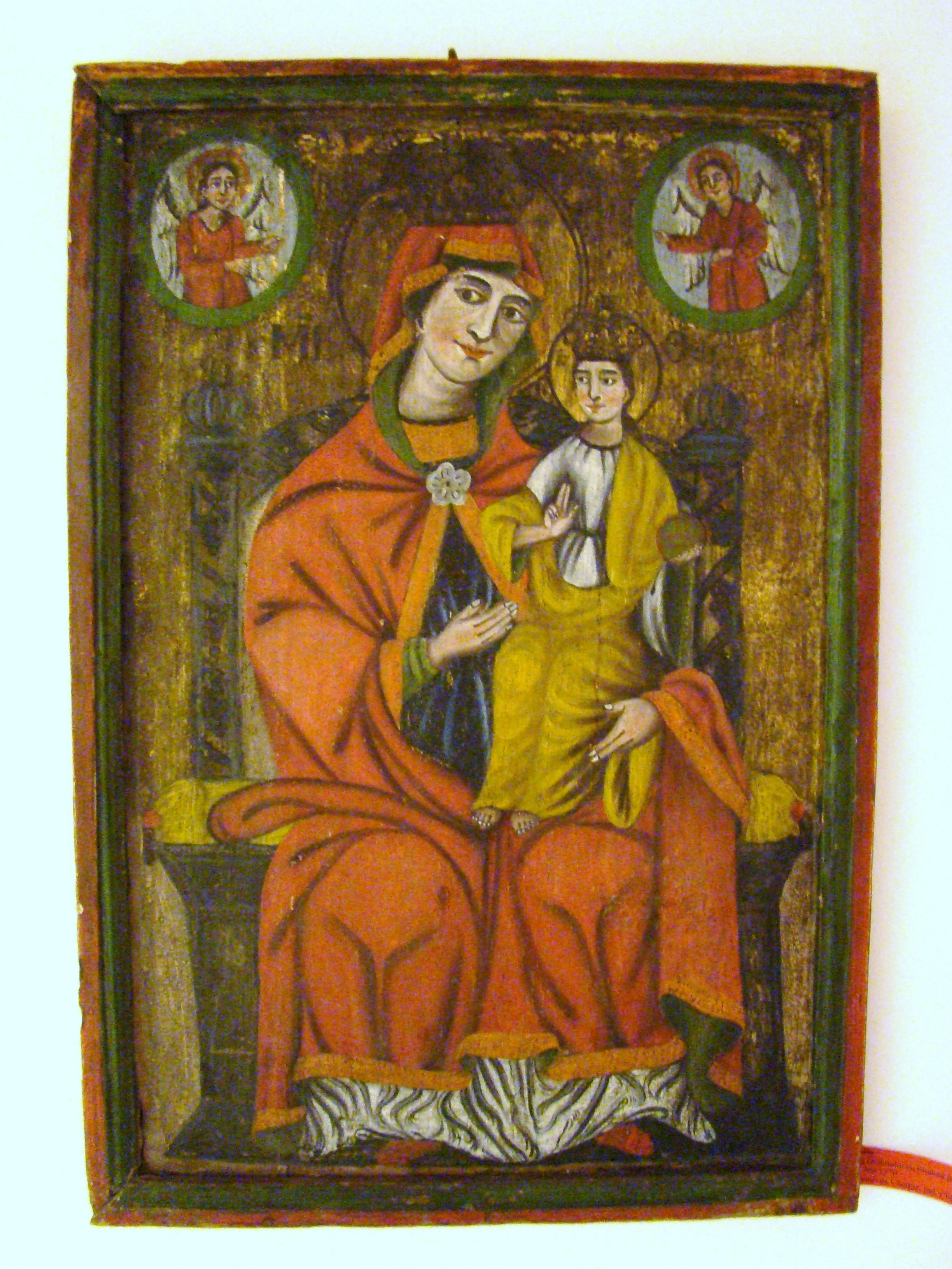 Icoană care a aparținut bisericii de lemn din Sava (Mureșenii de Câmpie)